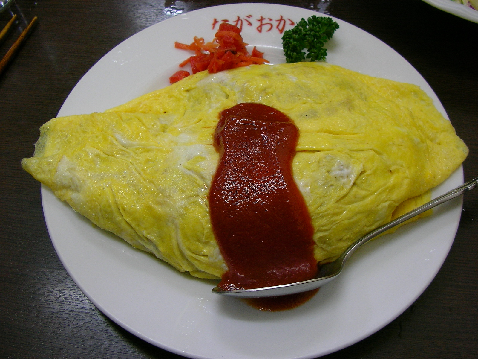 At a small restaurant